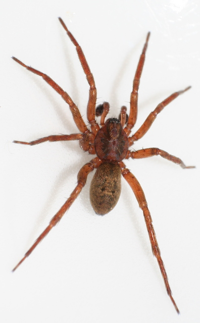 Agroeca brunnea, male